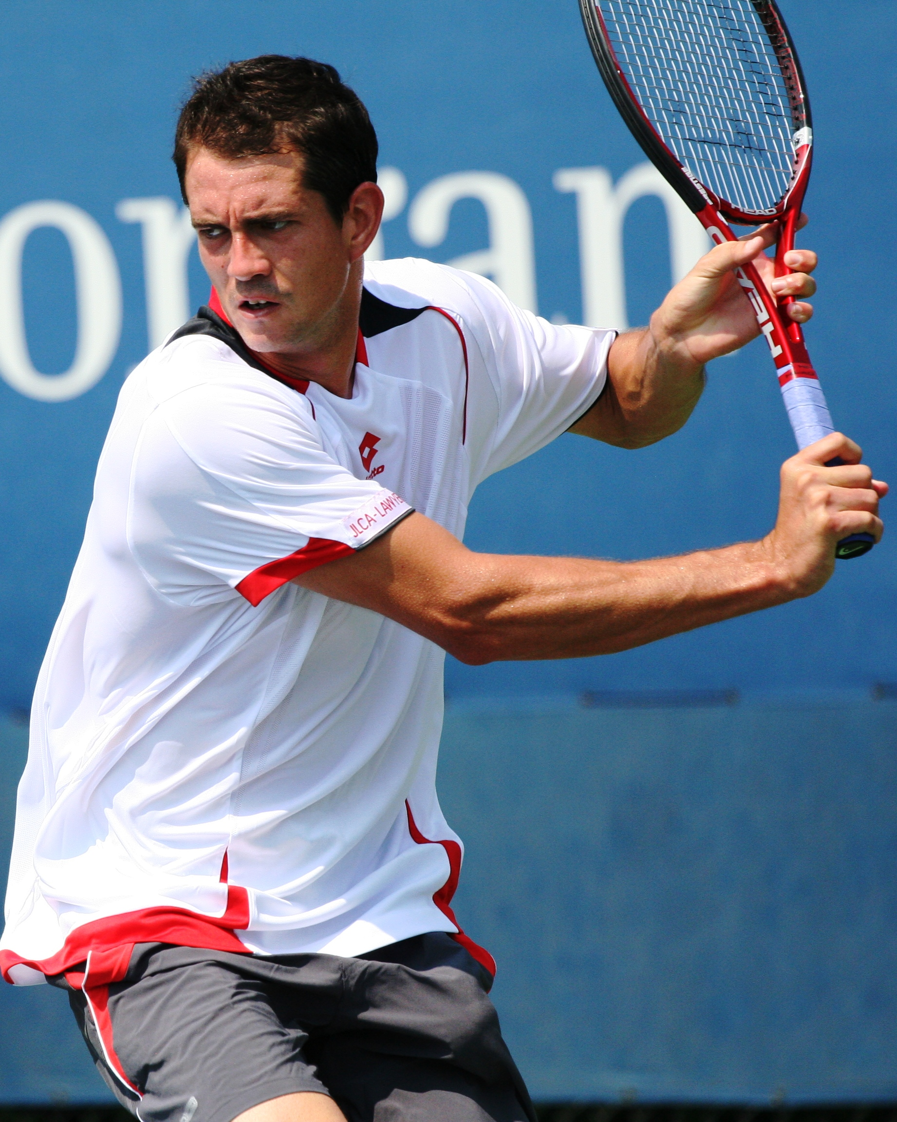 U.S. Open Wednesday, Sept. 1, 2010